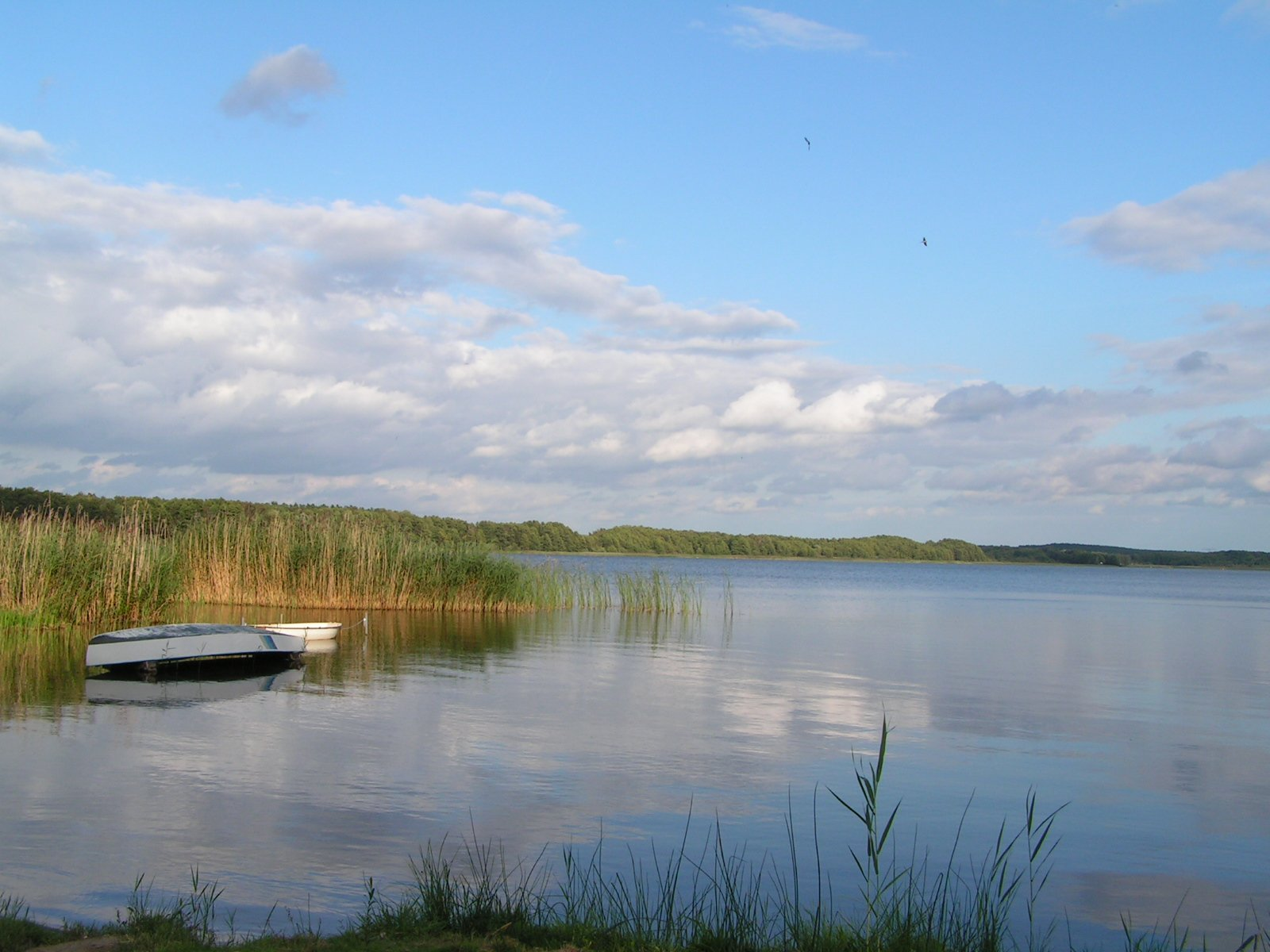 Blick auf den Großen Labussee, Landkreis Mecklenburg-Strelitz, Mecklenburg-Vorpommern